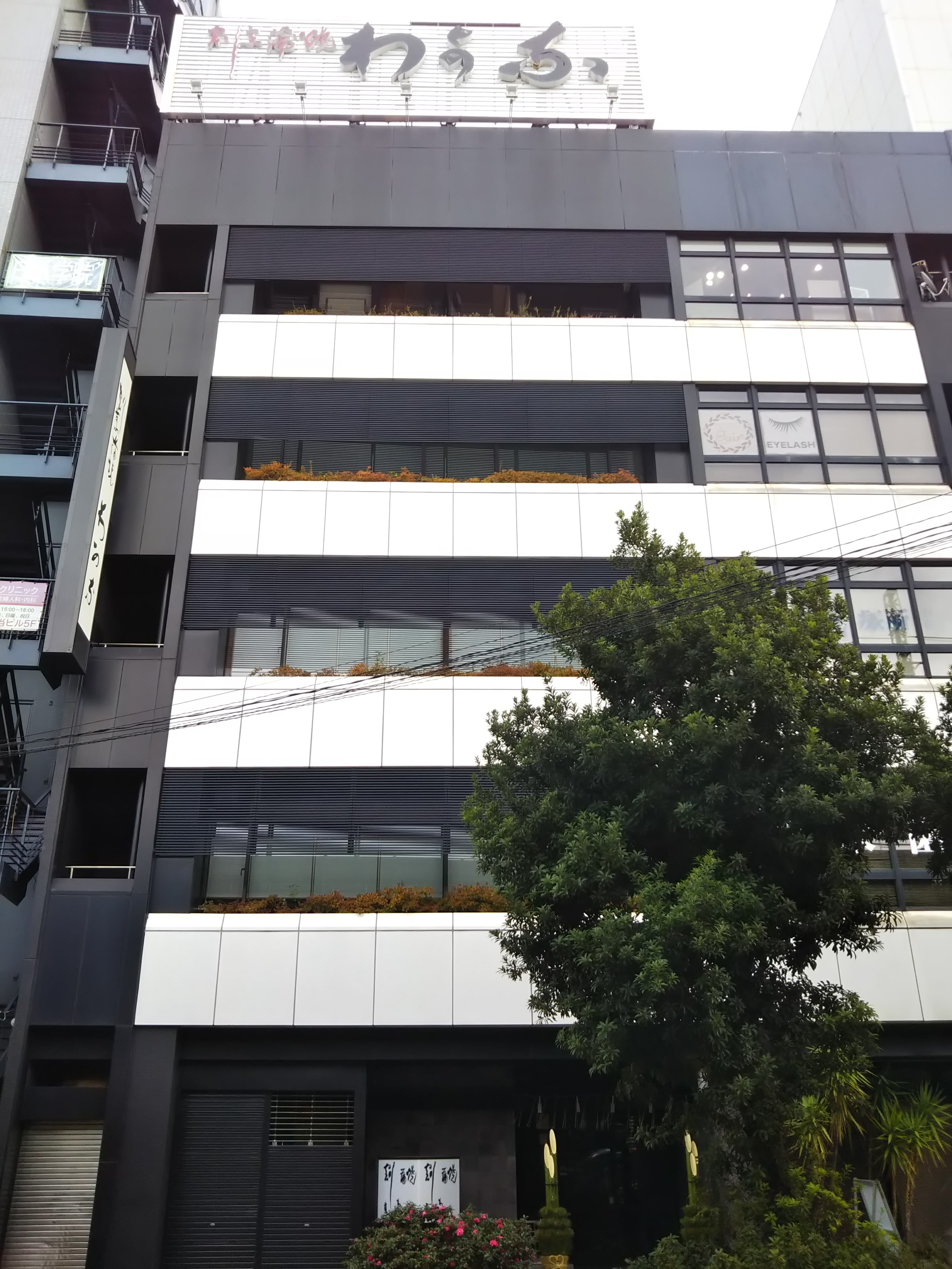 横浜市中区港町、割烹蒲焼わかな